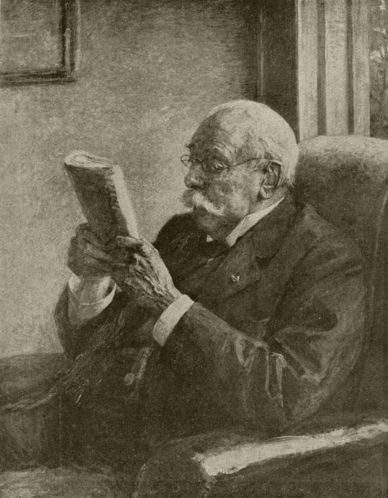 Portrait of N.P. van den Berg (1831-1917)